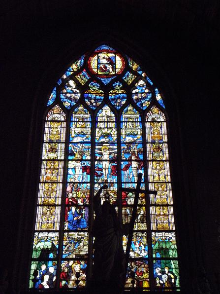 Maîtresse-vitre (Crucifixion) de la collégiale Ste-Madeleine de Champeaux (35)